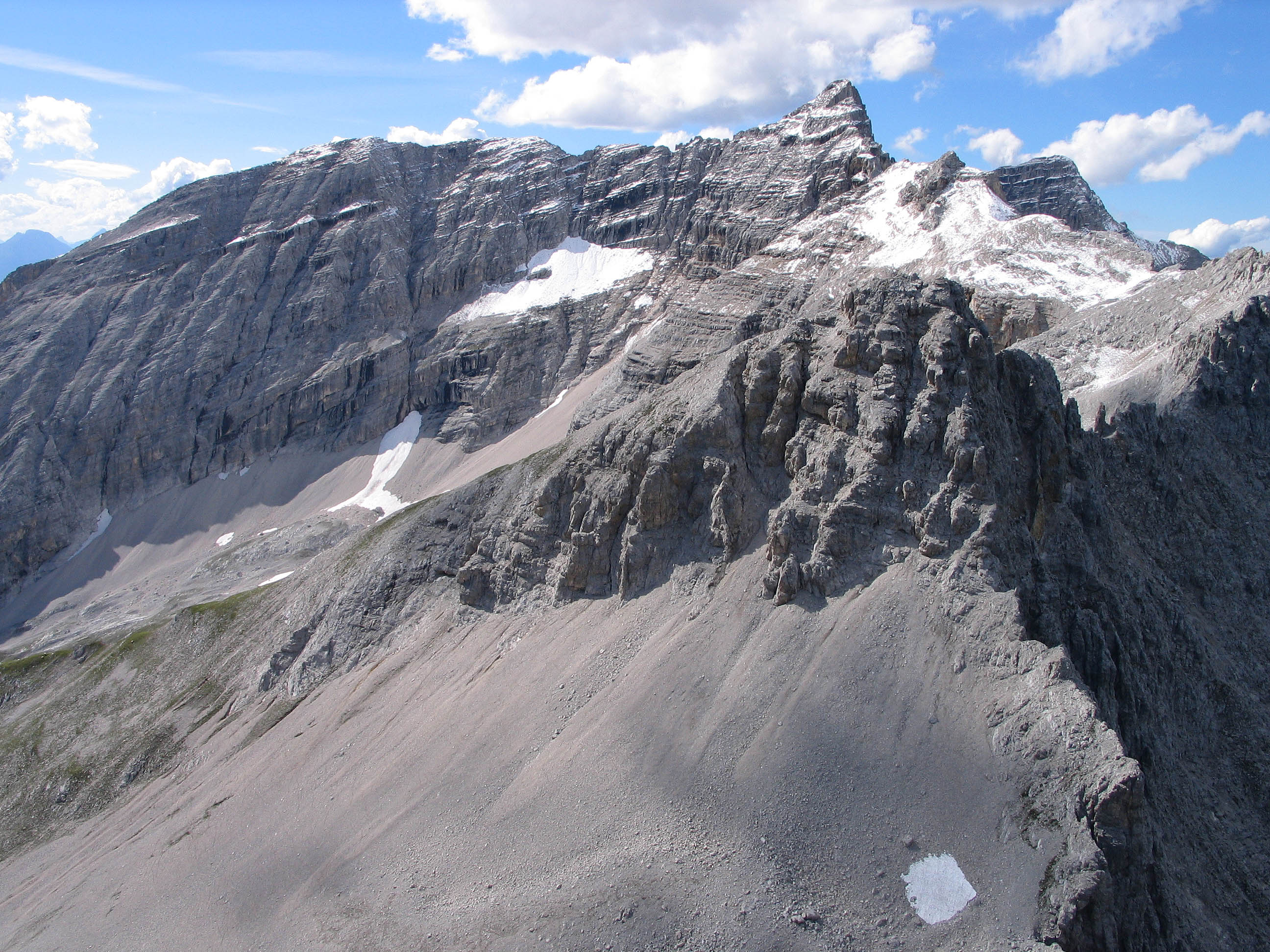 Kaltwasserkarspitze von der Moserkarspitze, Karwendel, Tirol, Österreich